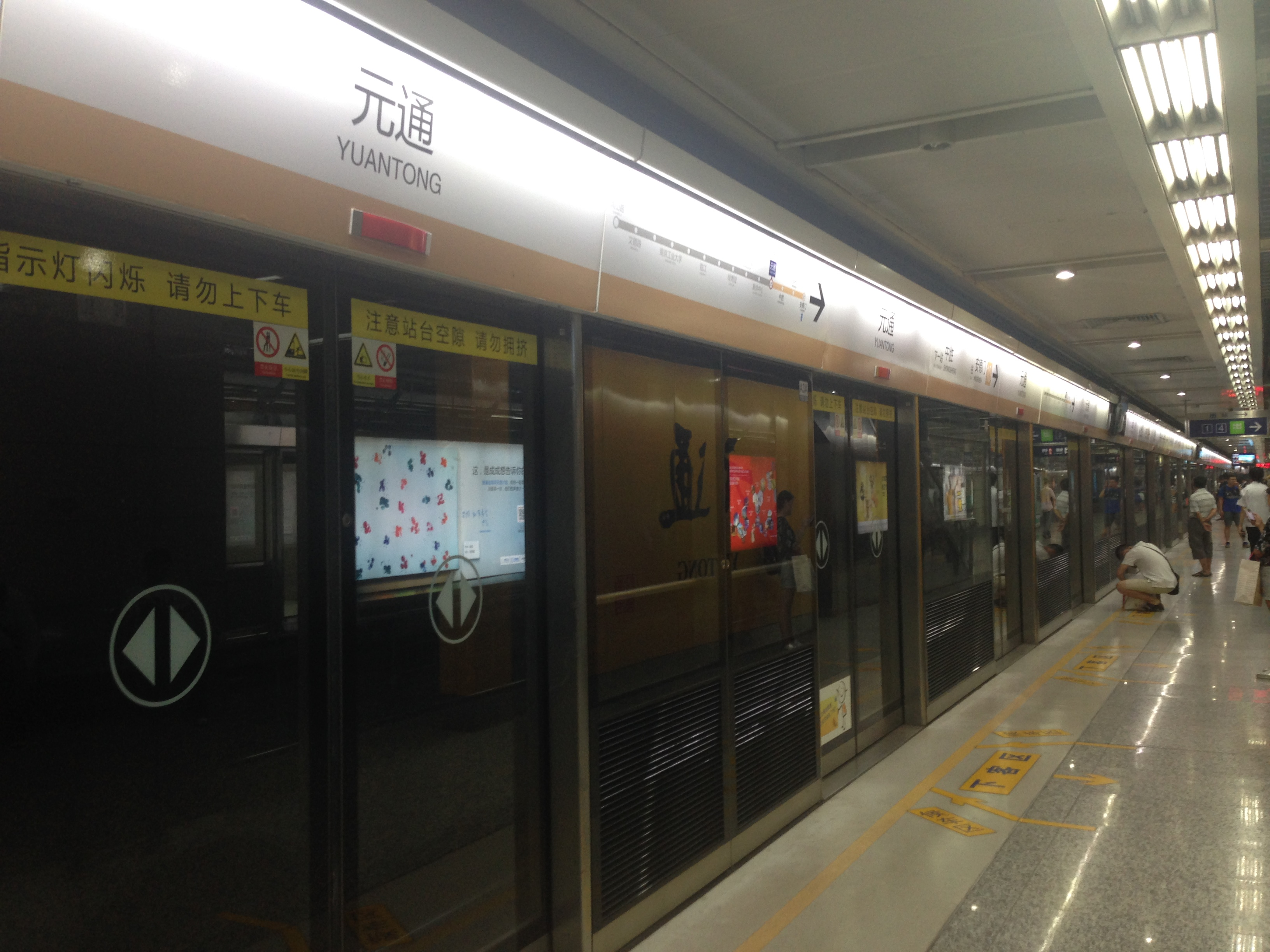 中文（中国大陆）: 南京地铁10号线元通站站台